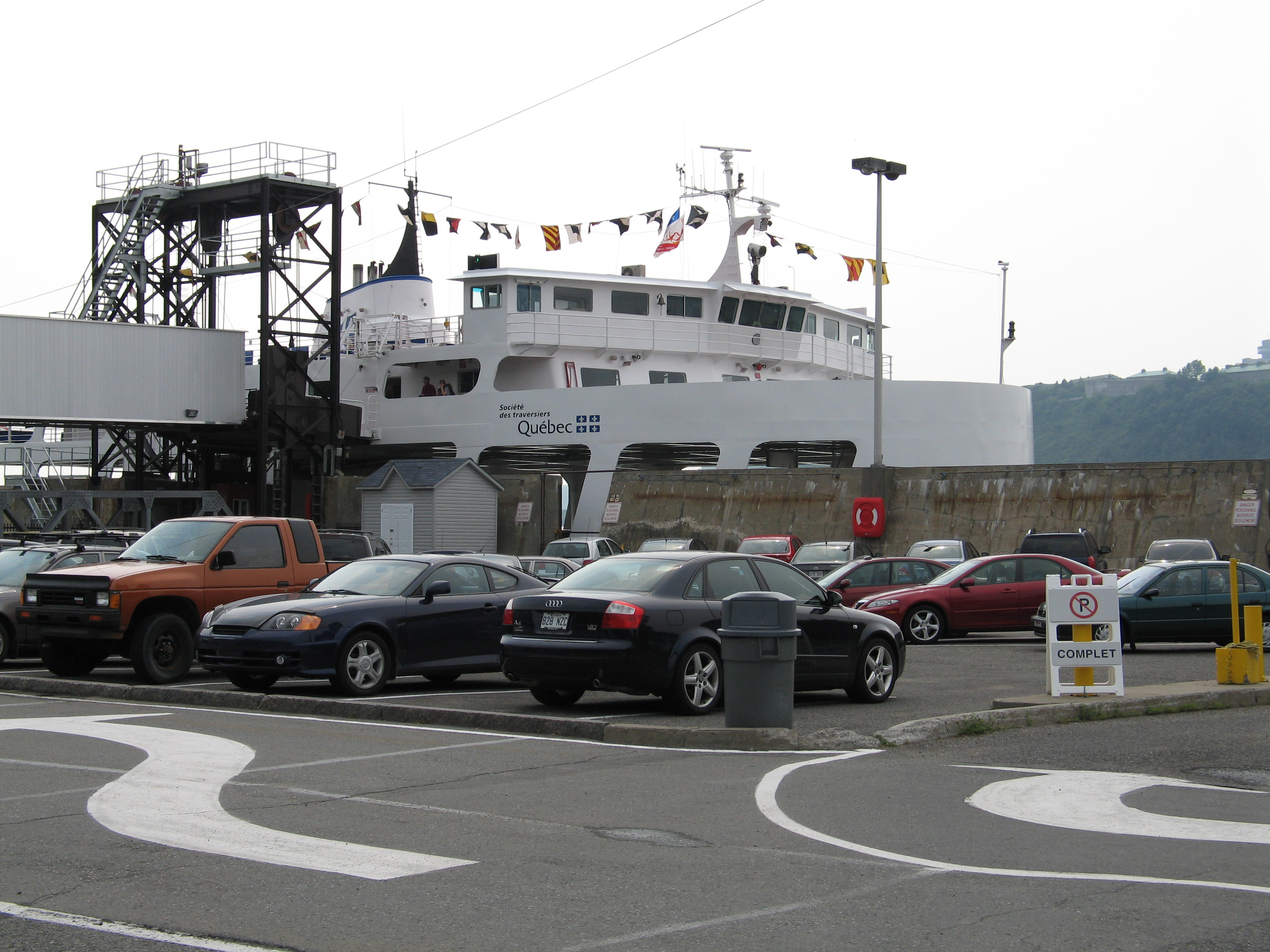 Le quai de Lévis de la Société des traveriers du Québec.